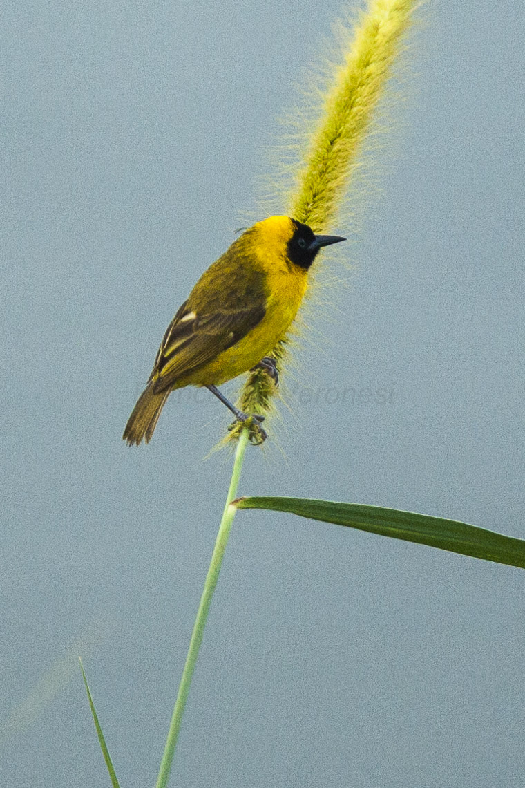 Slender-bill Weaver - Uganda_H8O3823